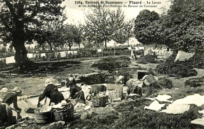 Le lavoir de Ploaré et les anciennes fortifications du manoir de Coataner (carte postale Villard, vers 1920)